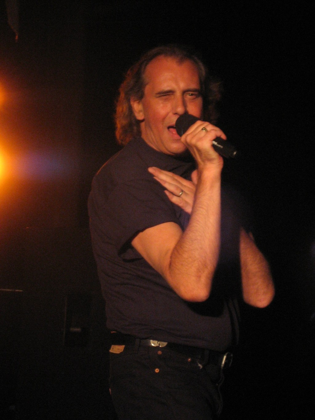 Víťezslav Vávra 21.6.2007